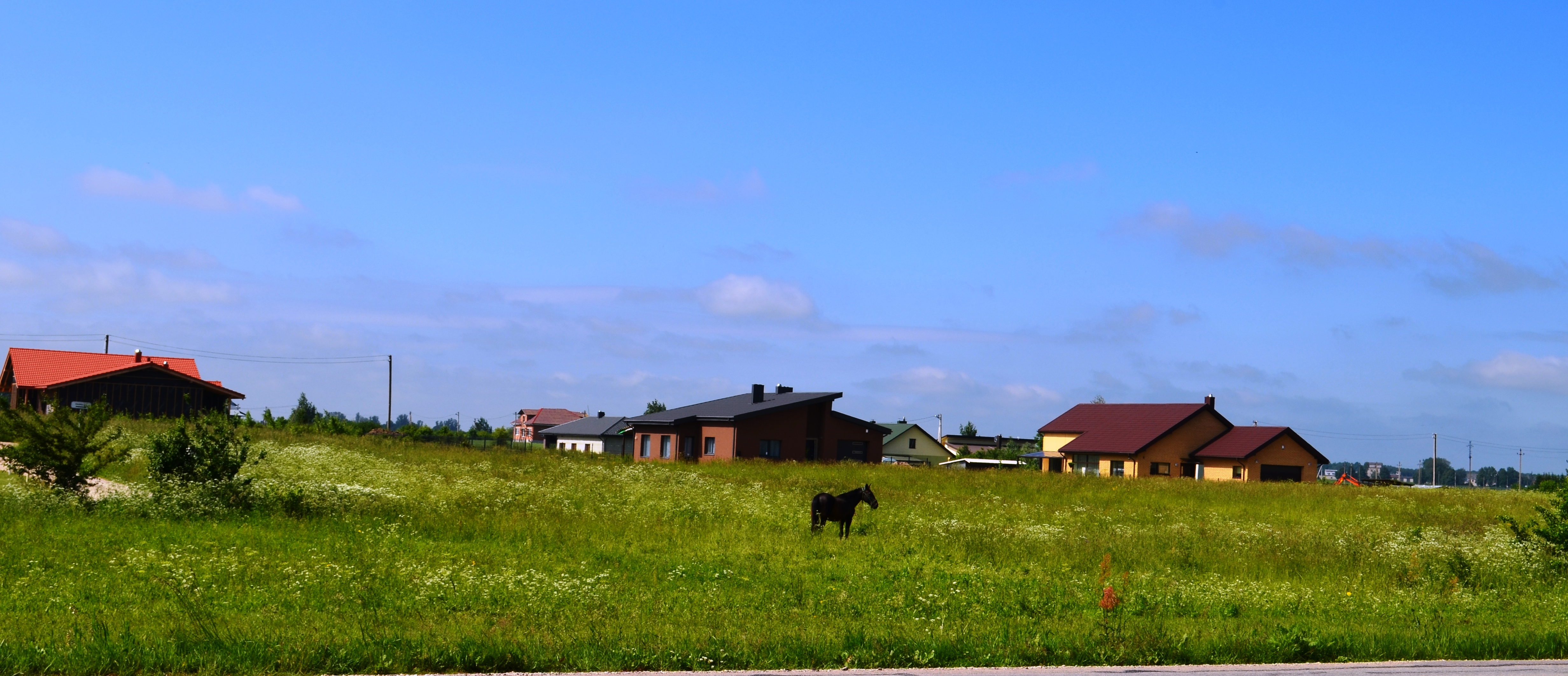 Janušava (kaimas), Kėdainių raj.